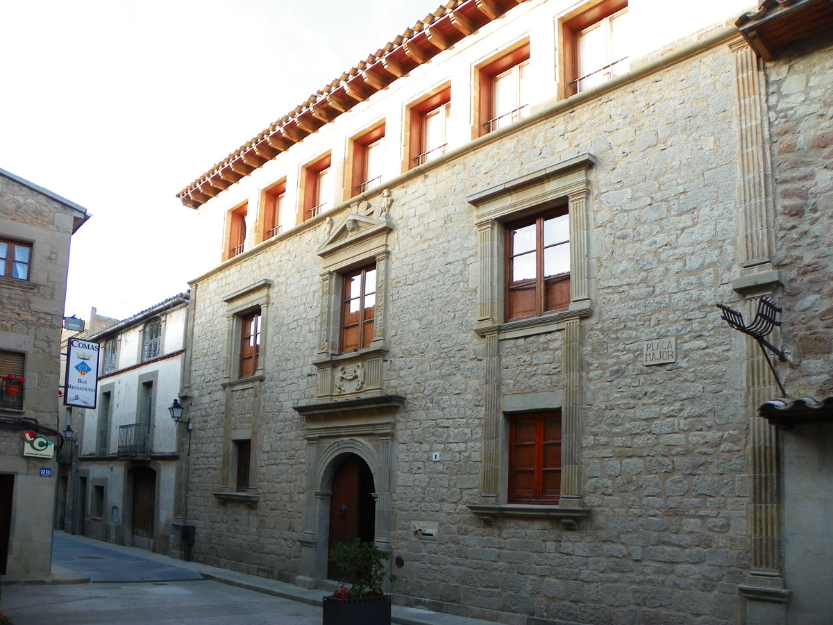 Ajuntament de Sant Feliu Sasserra